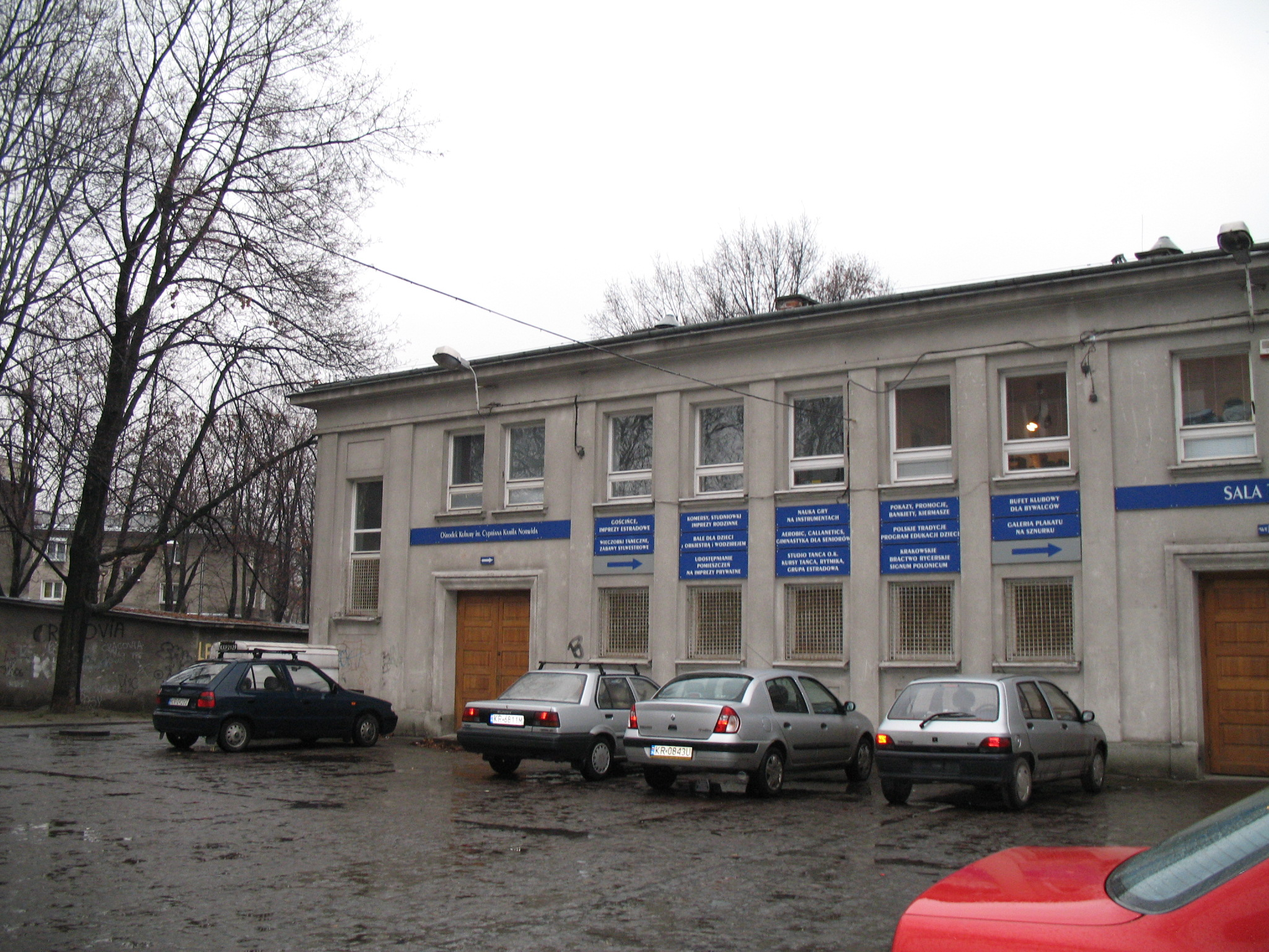 Ośrodek kultury im. Norwida w Krakowie.